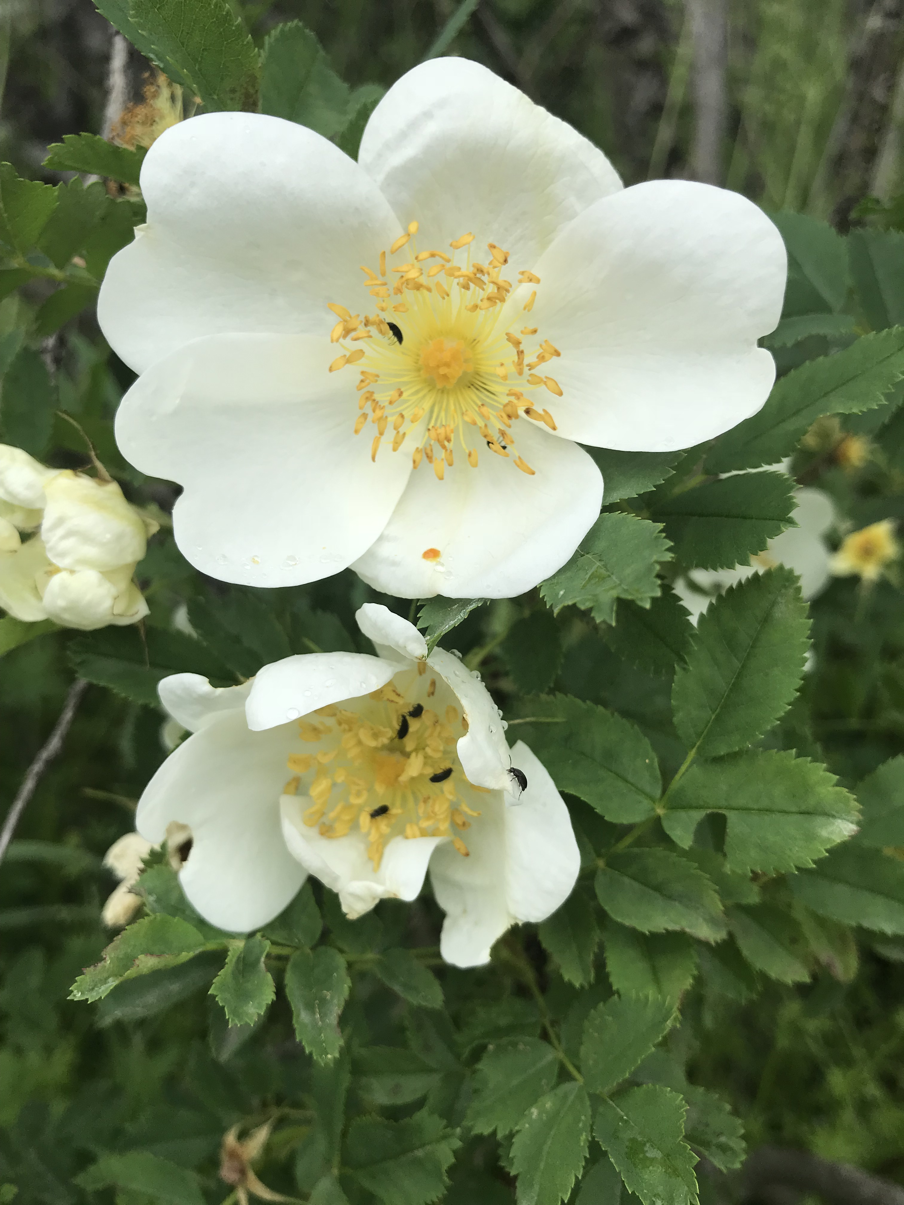 Խոսրով